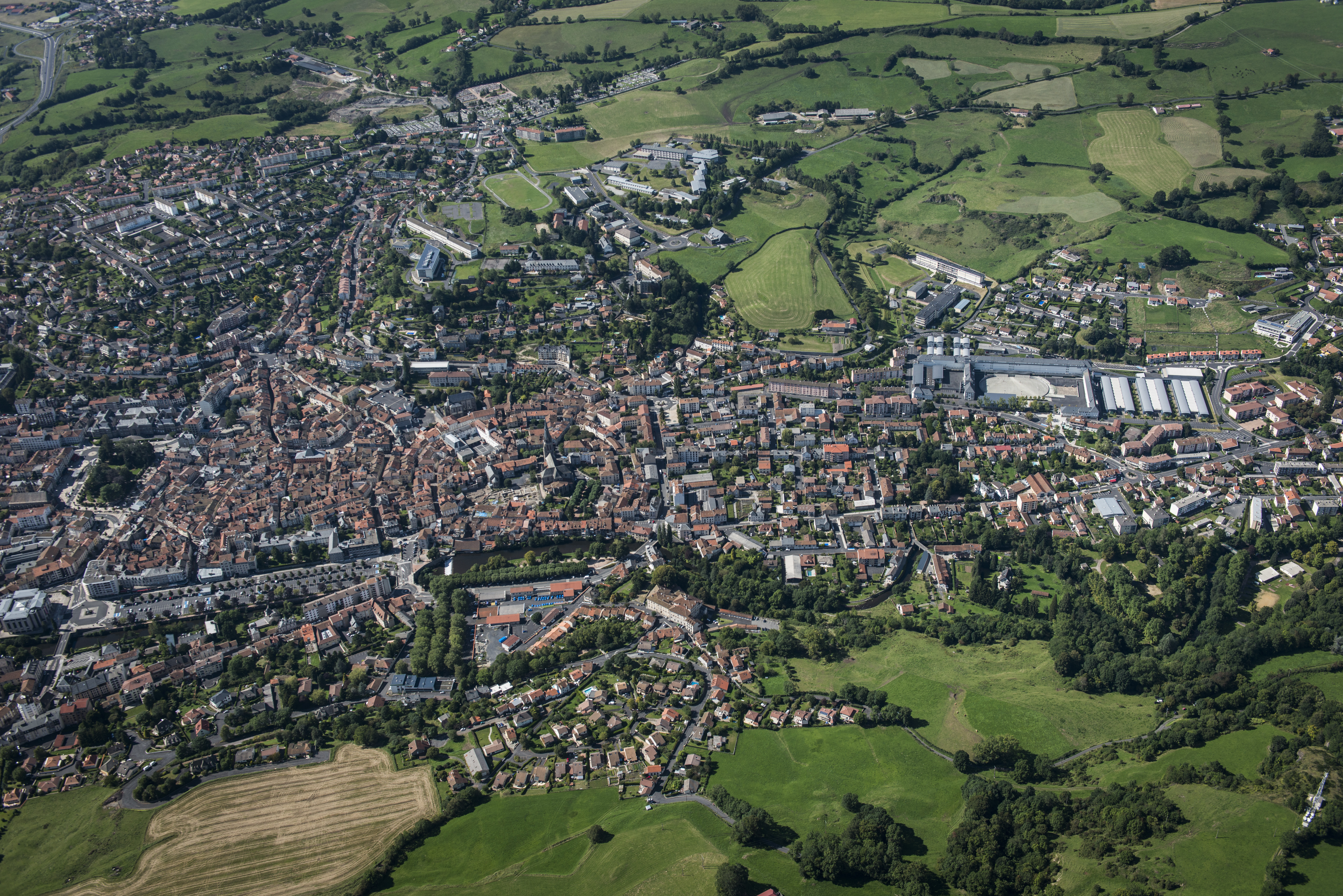 Aurillac vu du ciel